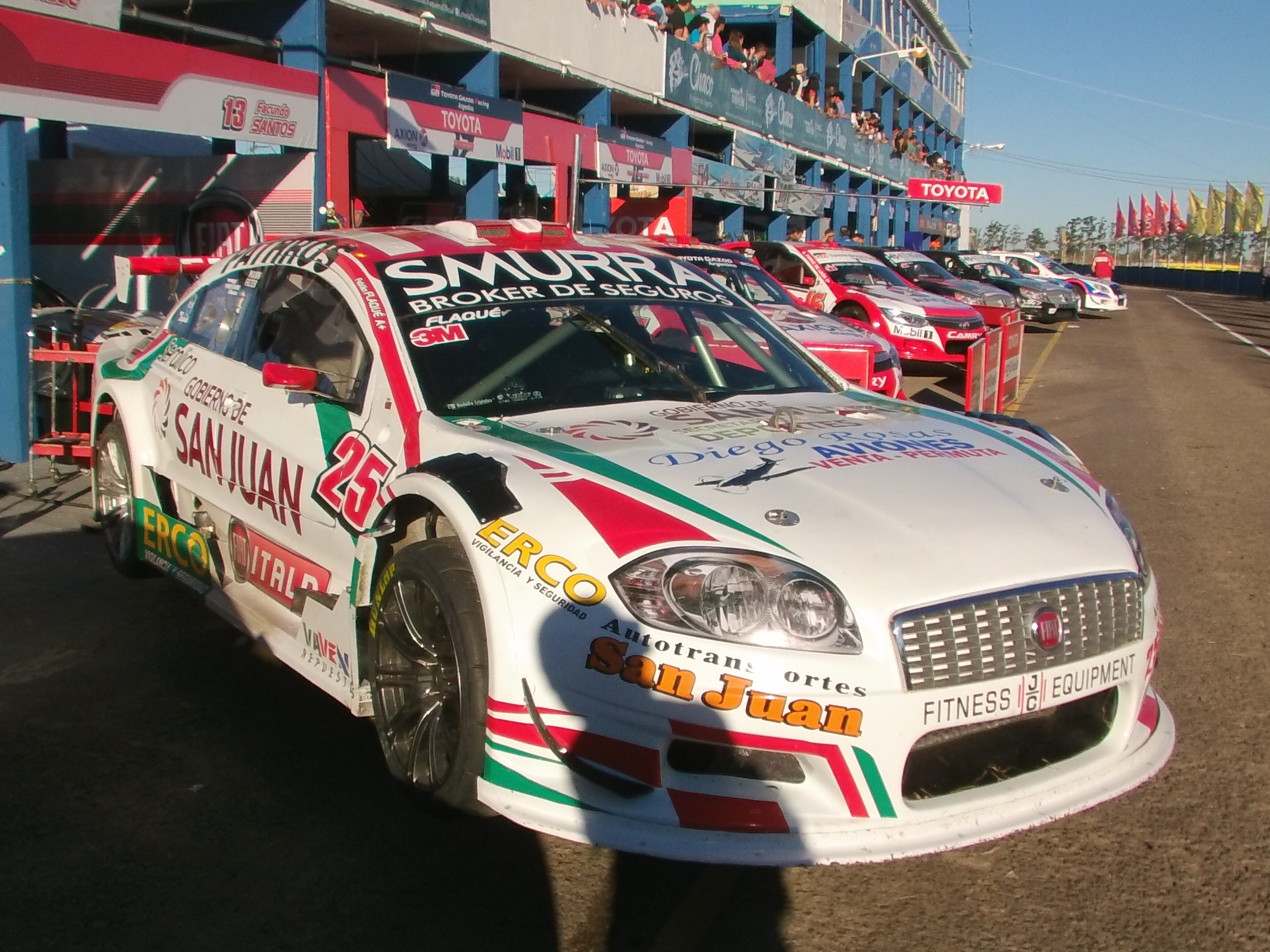 Unidad Fiat Linea TRV6, presentada en el año 2017 para la categoría argentina de automovilismo de velocidad, Top Race V6